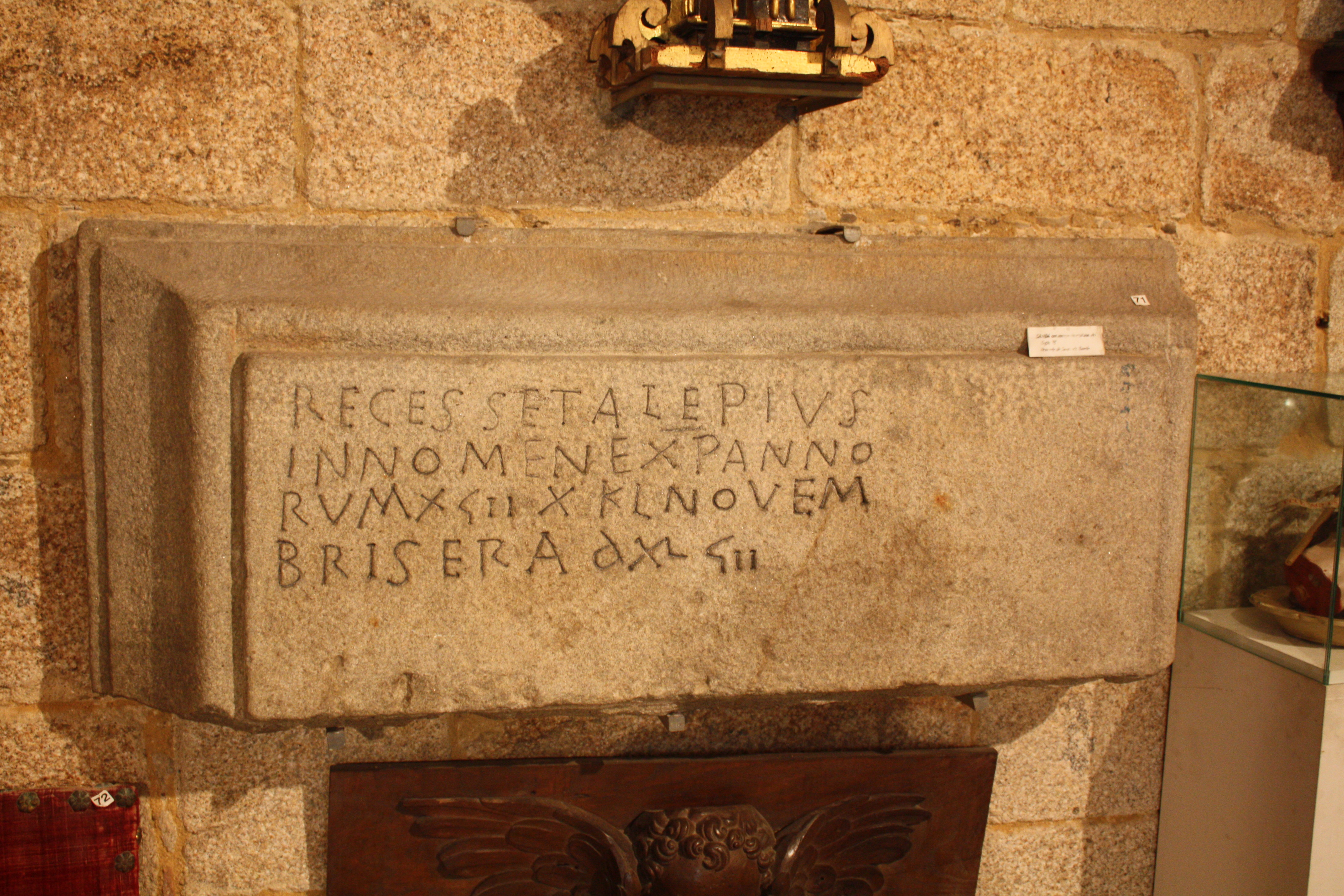 Lápida do s. VI, a máis antiga de Galicia. Procede de Baños de Molgas e está exposta no Museo Catedralicio de Ourense